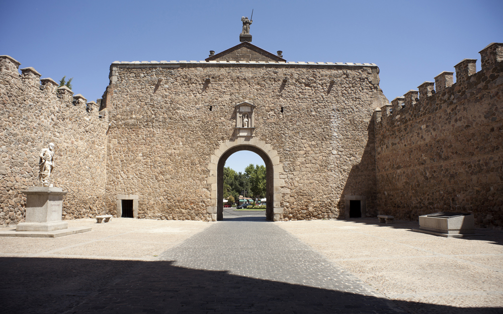 Cultural Heritage Spain RI-51-0000207